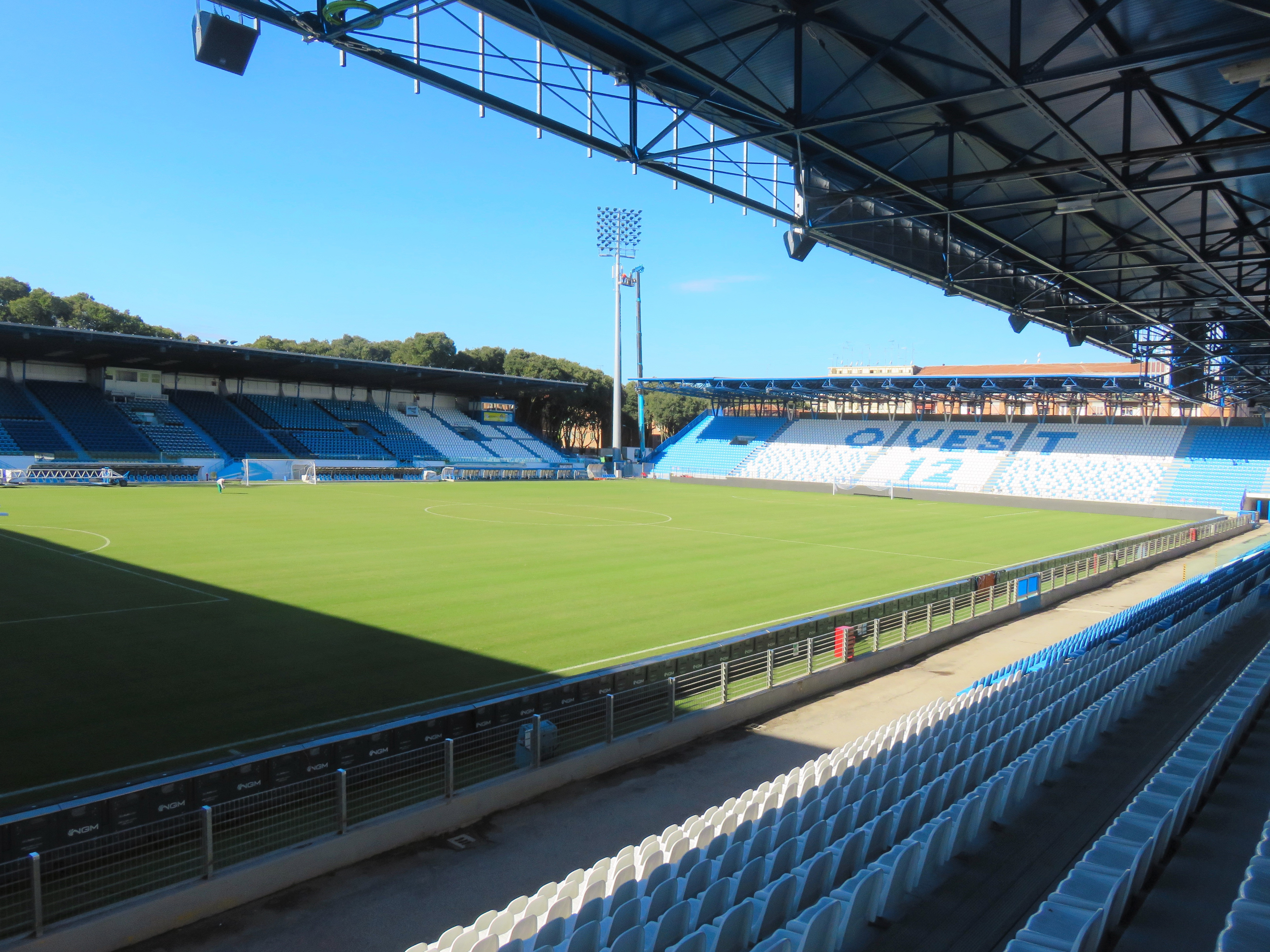 Stadio dopo i lavori di ampliamento, ottobre 2018